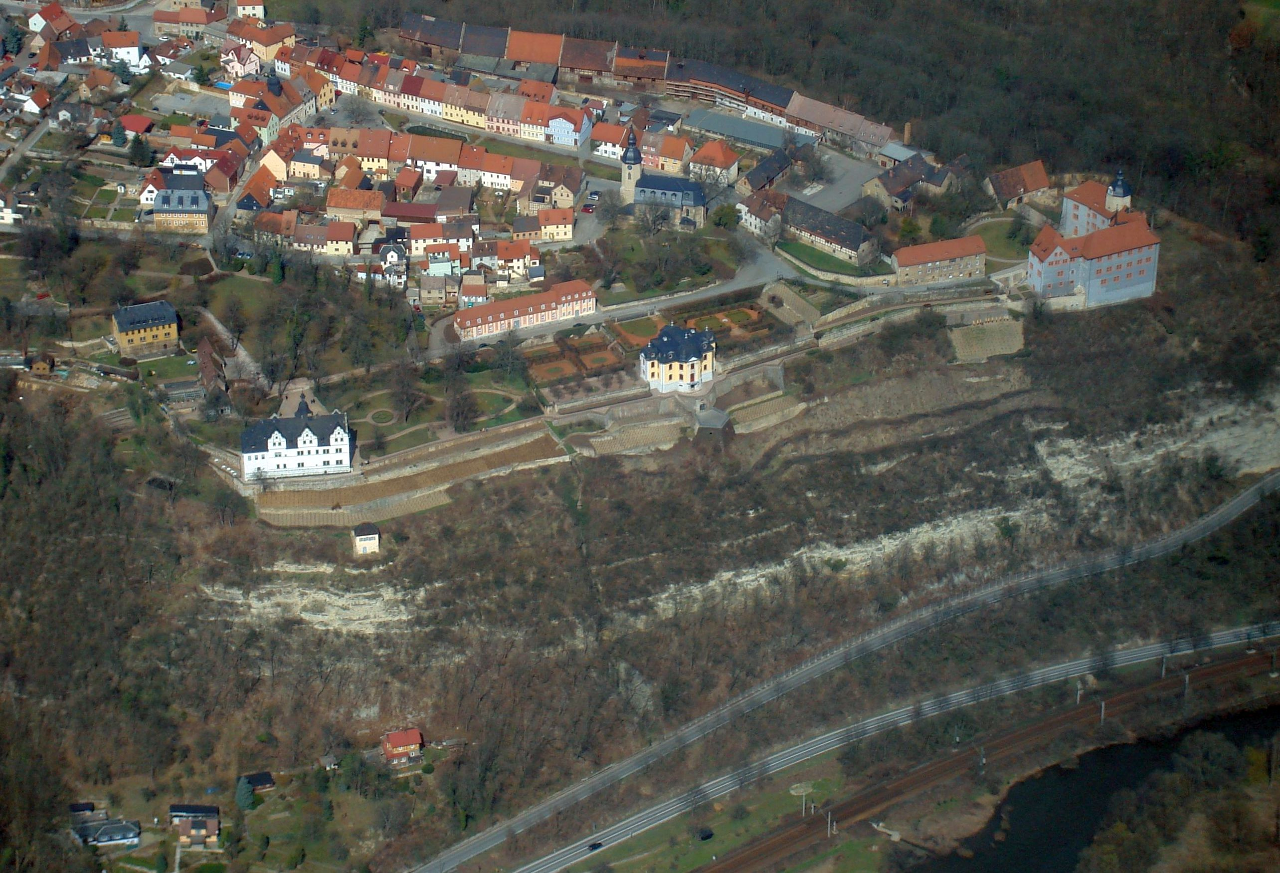 Luftbildaufnahme der Dornburger Schlösser